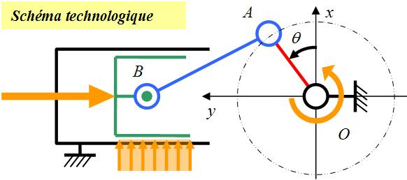 Schéma technologique. Position relative de l'axe de piston et de la surface de guidage avec la chemise.